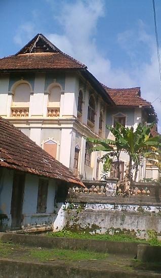 പുത്തൻ മാളിക